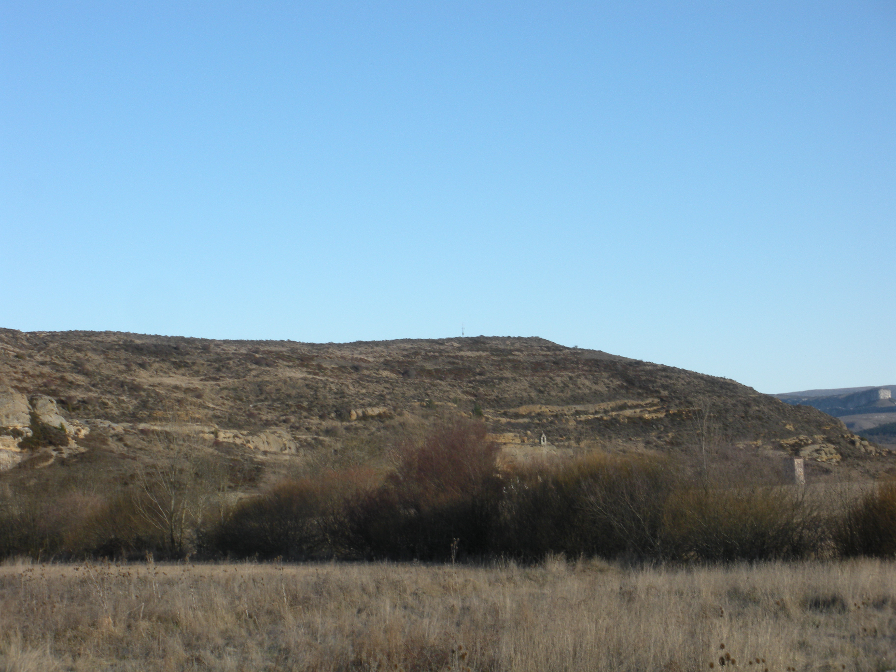 Vista del monte Cildá, junto a Olleros de Pisuerga, en Aguilar de Campoo (España)